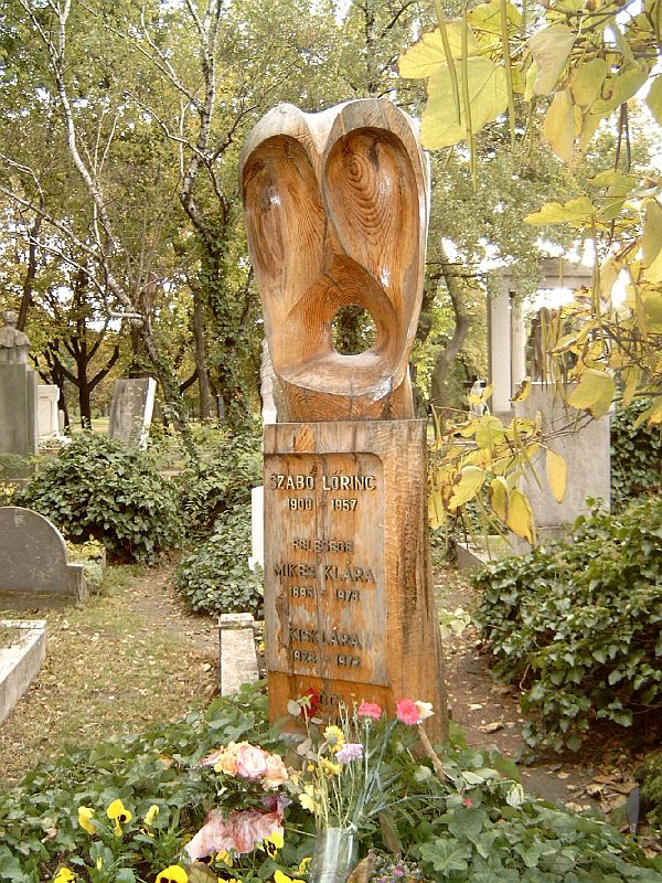 Szabó Lőrinc (Miskolc, 1900. márc. 31. – Bp., 1957. okt. 3.) költő sírja Budapesten. Kerepesi temető: 34-5-43/44 [szobrász: Csóti Imre].